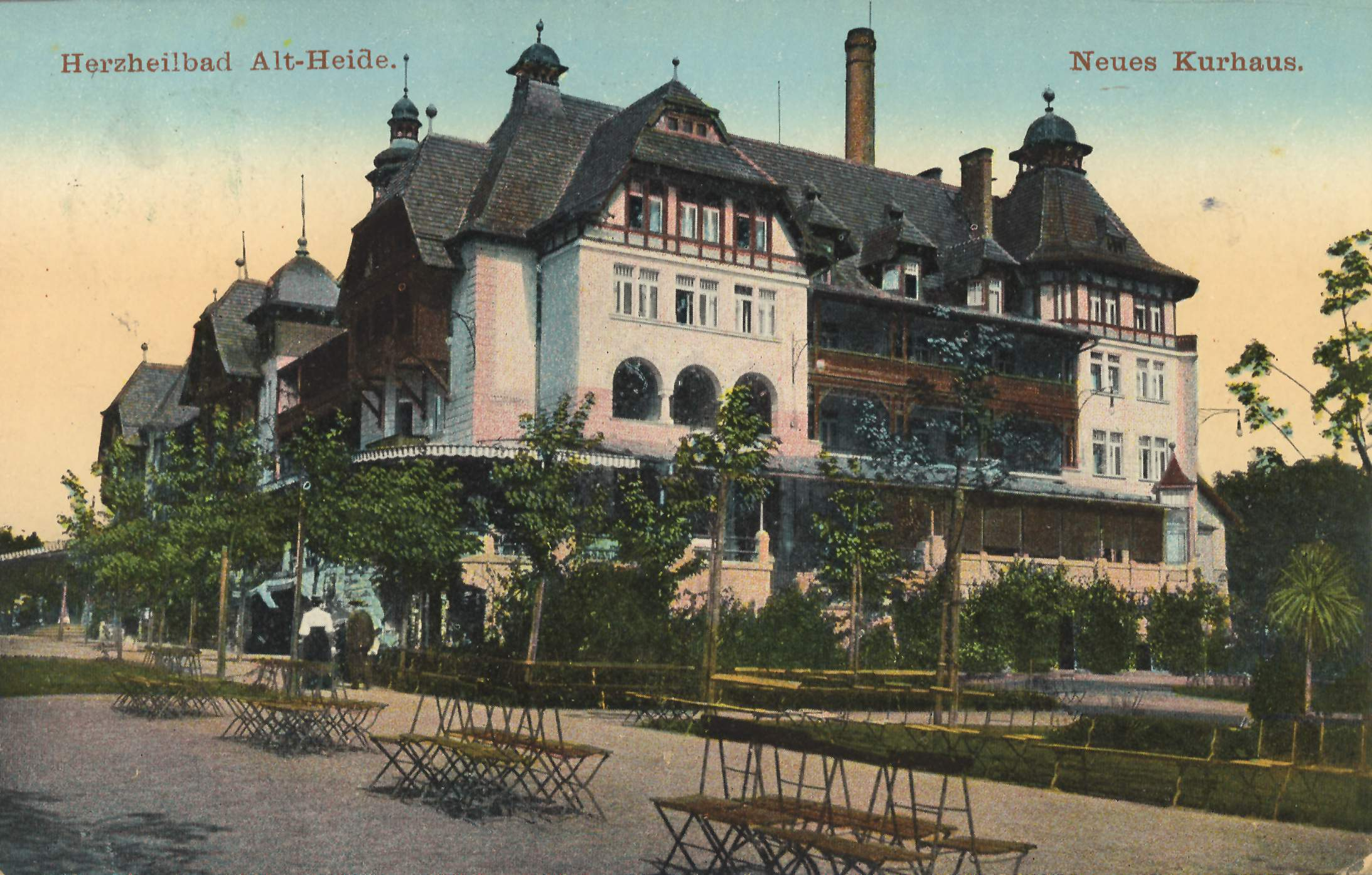 Sanatorium Wielka Pieniawa (ehem. Neues Kurhaus) in Polanica-Zdrój (dt. Altheide-Bad)